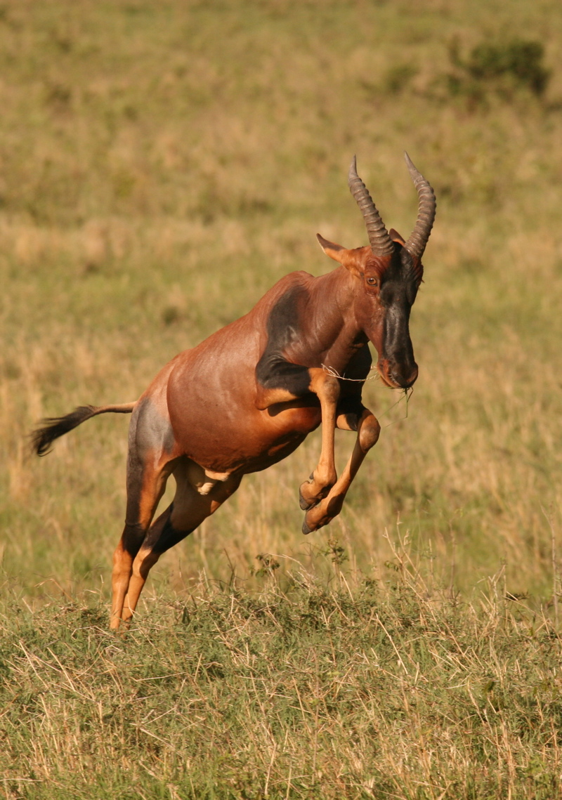 Topi (Damaliscus lunatus), Masai Mara, Kenya